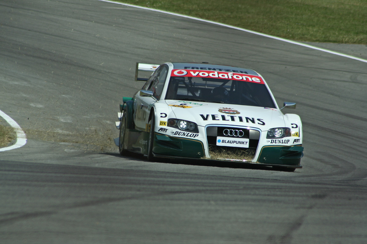 Heinz-Harald Frentzen driving for Audi in the 2006 Deutsche Tourenwagen Masters season.